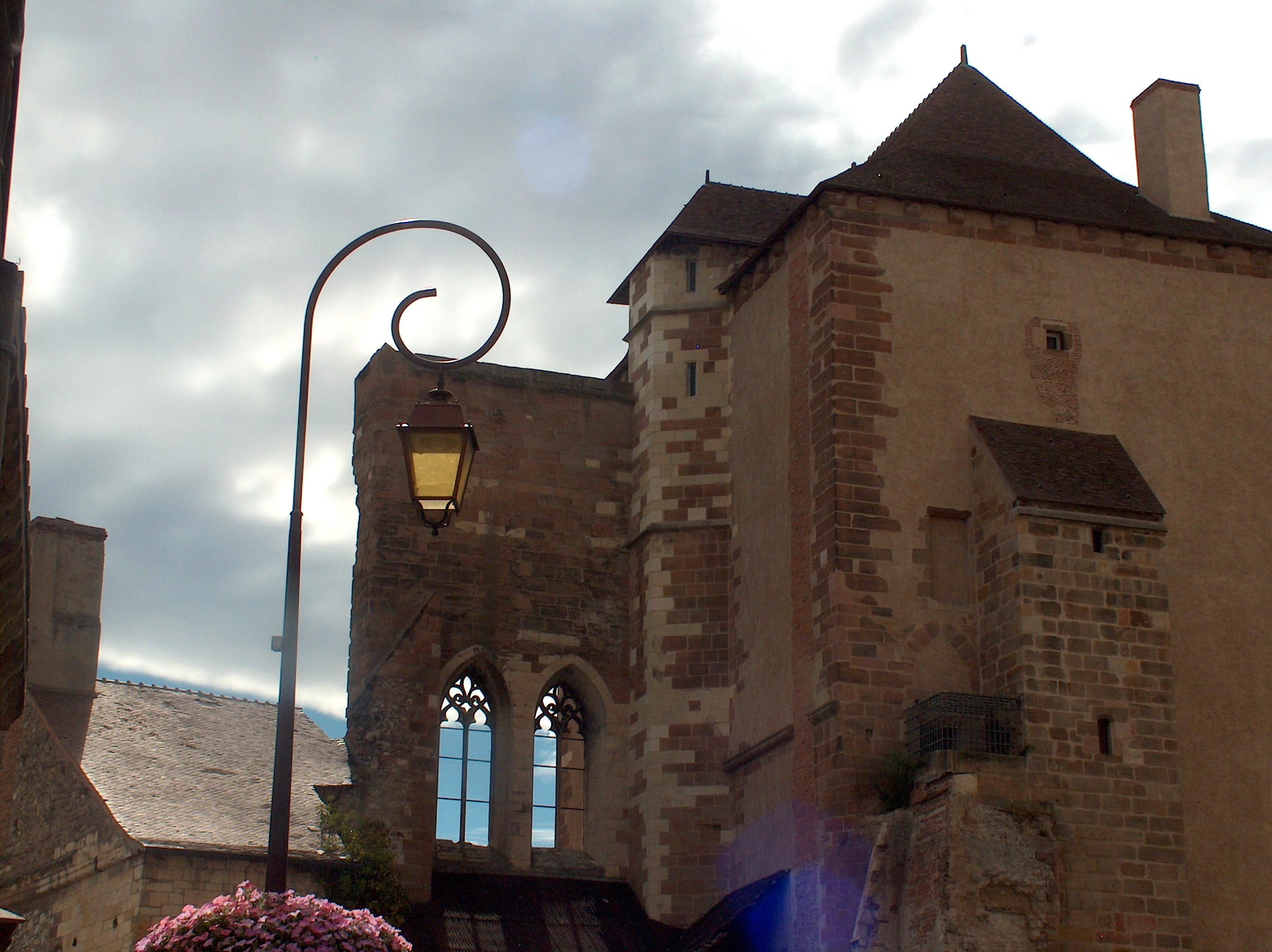 L'ancien château, palais des ducs de bourbon, fut une prison durant la deuxème guerre mondiale. Louis XIV trouvait cette tour "bien mal coiffée" ; depuis, le nom de "Mal Coiffée" est resté.